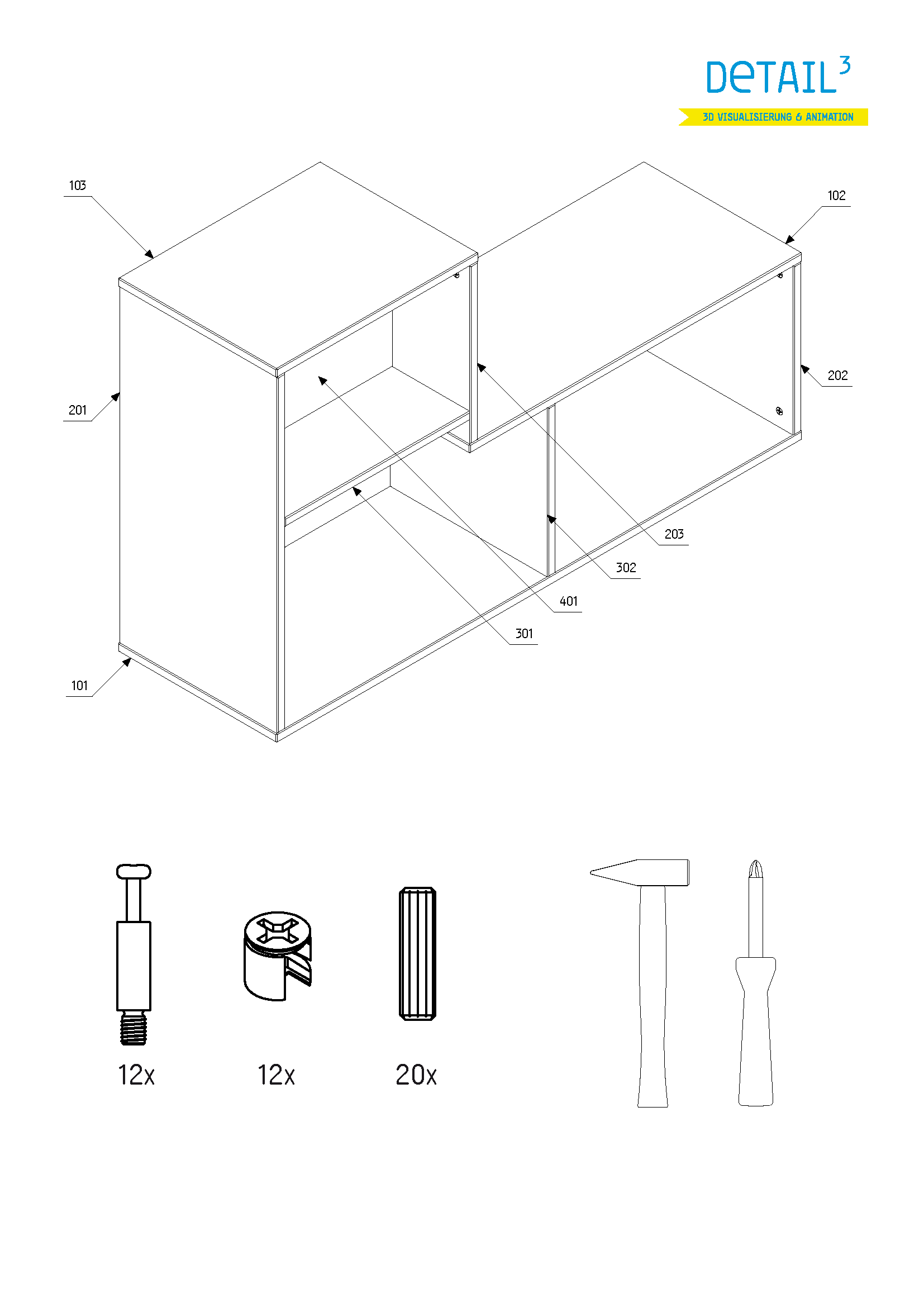 Beispiel 1 einer Montageanleitung